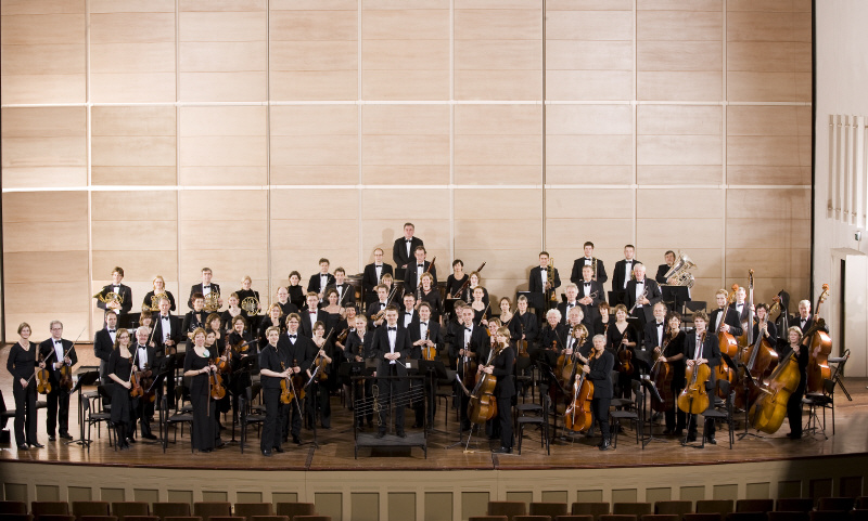 Symfonieorkest Nijmegen in de grote zaal van de Concertgebouw de Vereeniging